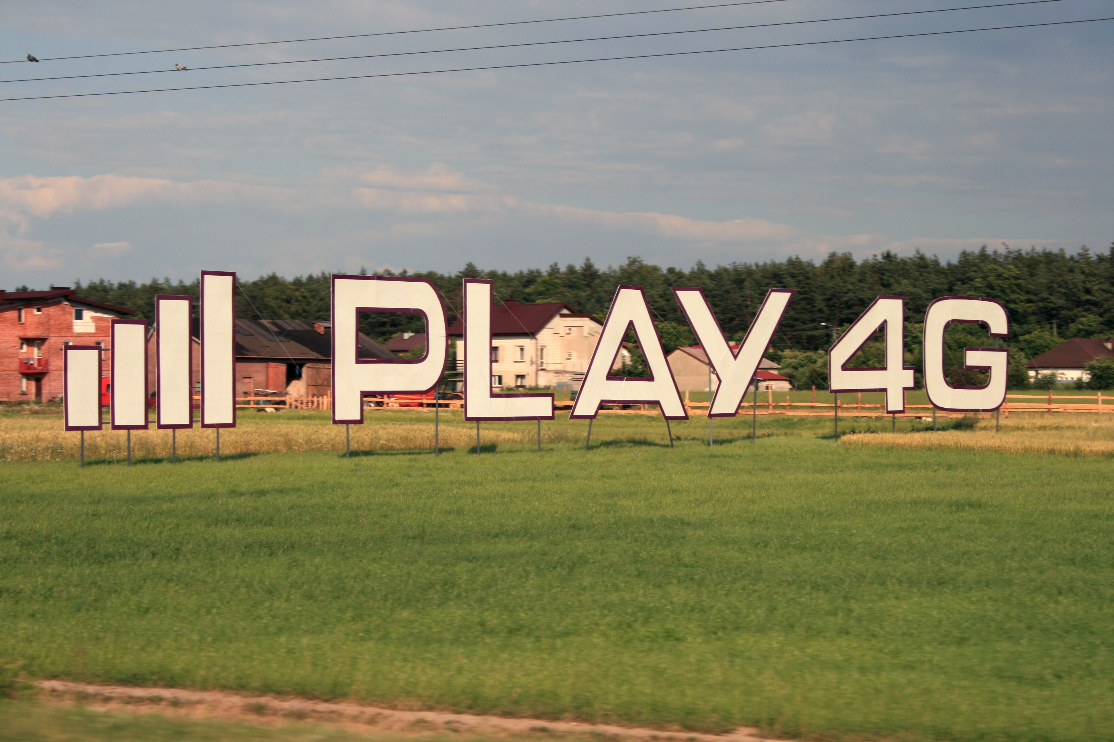 Poland